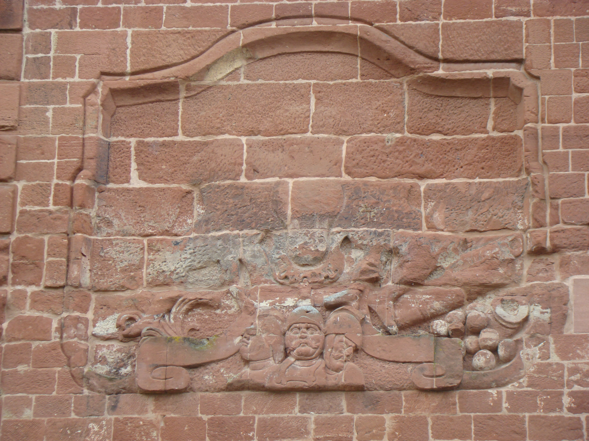 Relief am Landauer Tor in Lauterbourg